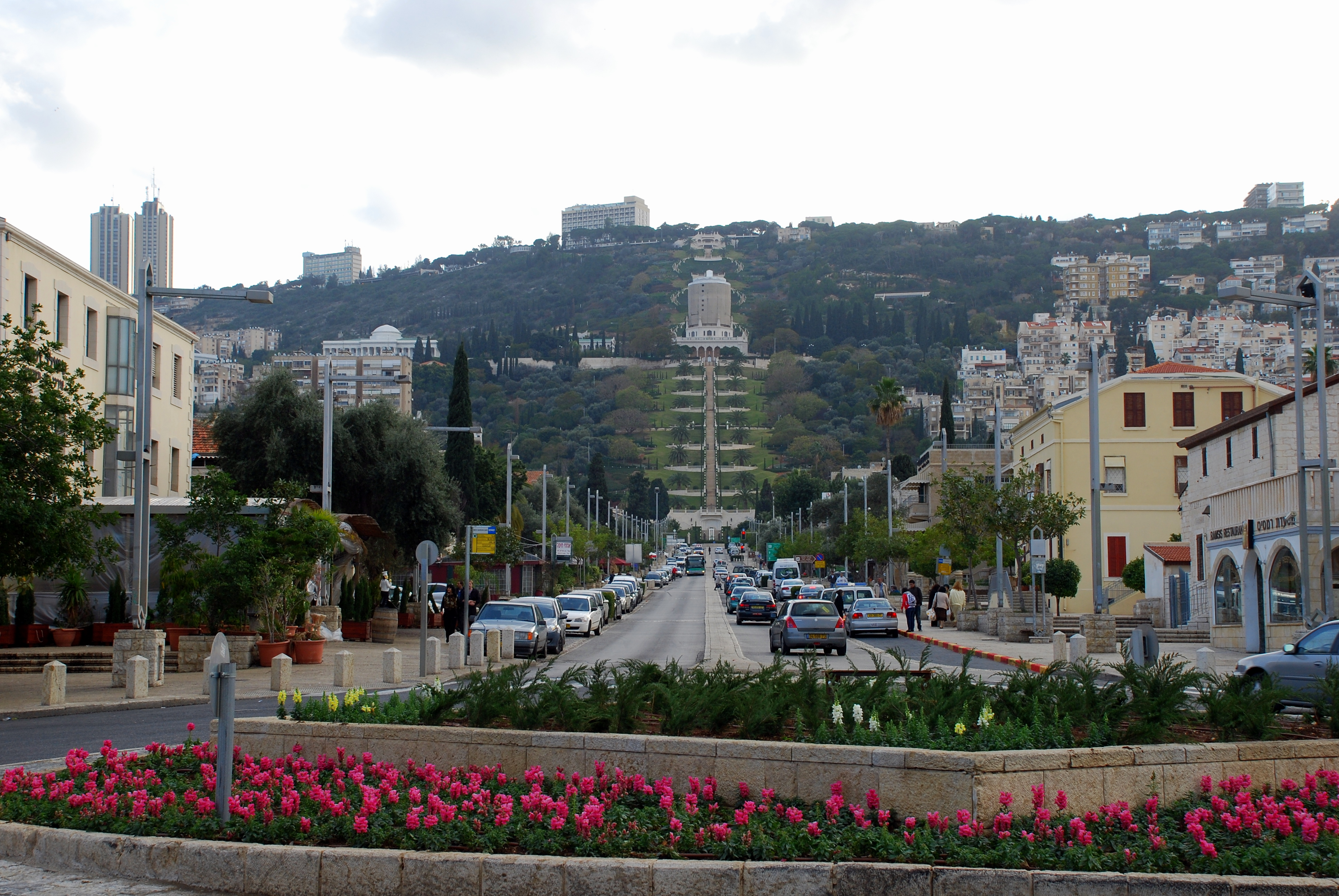 Haifa, Israel German Colony Haifa